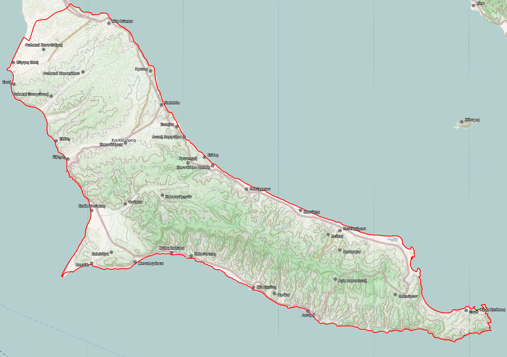 Τοπογραφικός χάρτης του Δήμου Κασσάνδρας